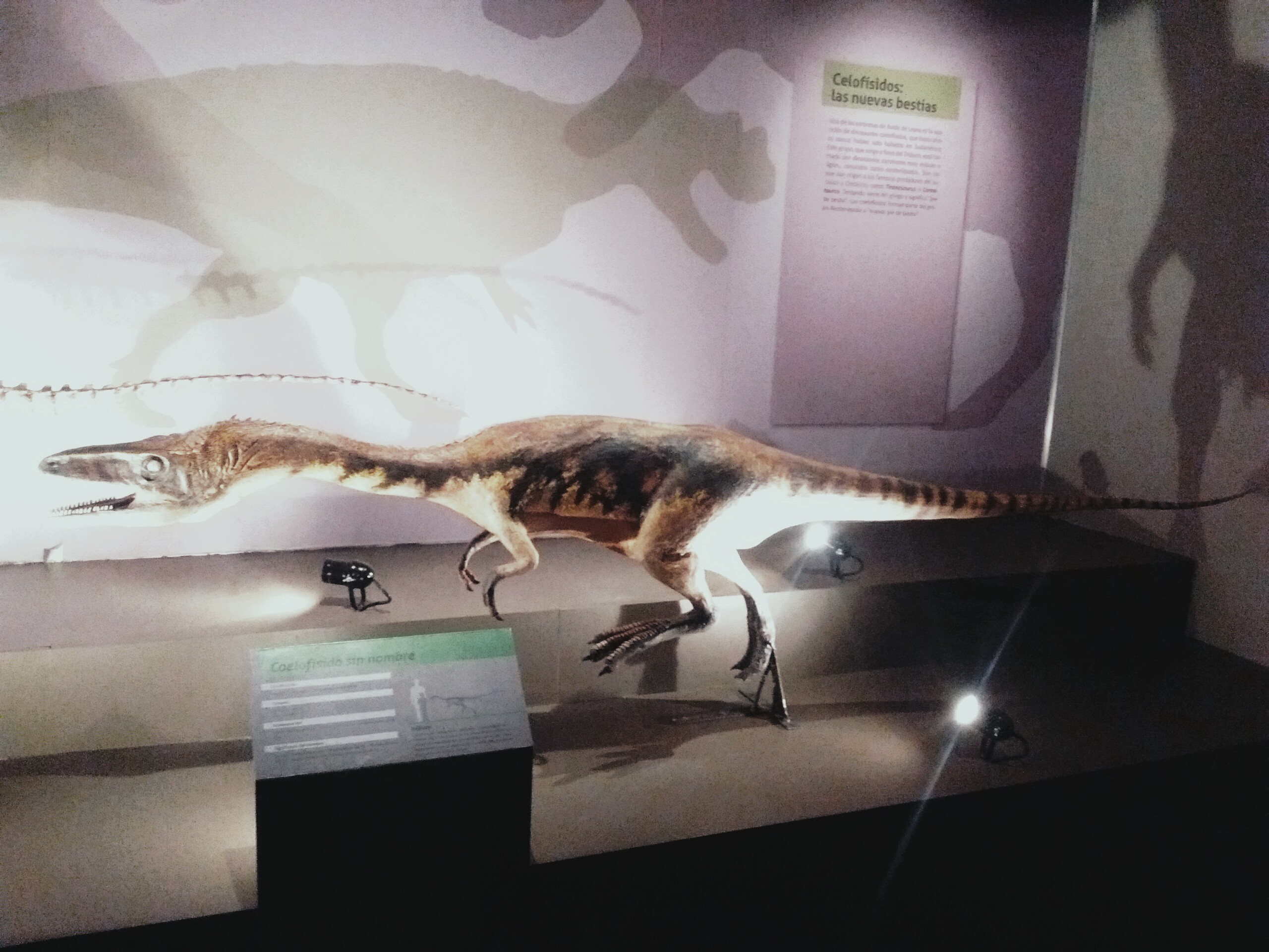 Recreación paleoartística de Lucianoventor